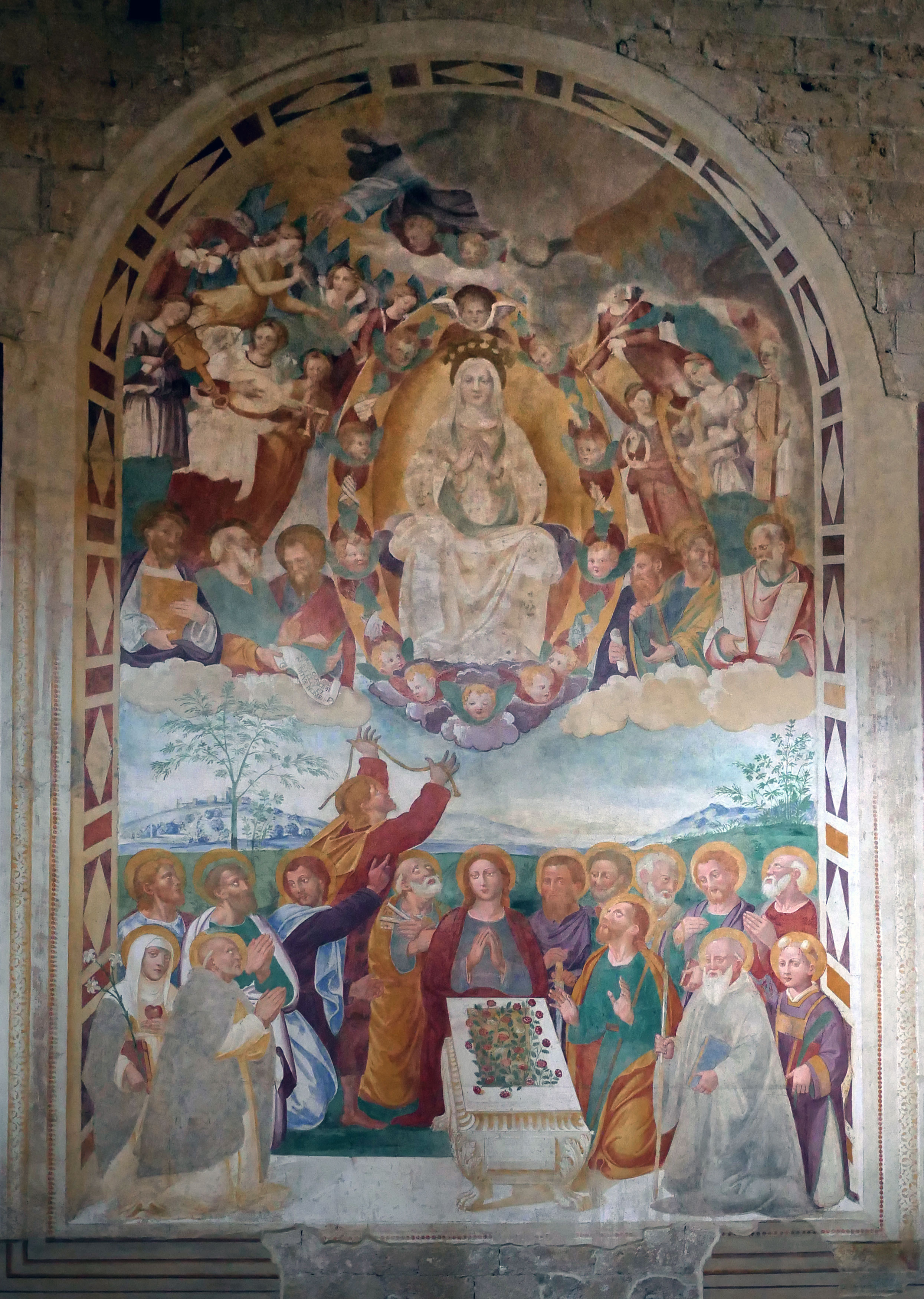 Vincenzo Tamagni - Assunzione della Vergine - Abbadia a Isola Monteriggioni (SI)